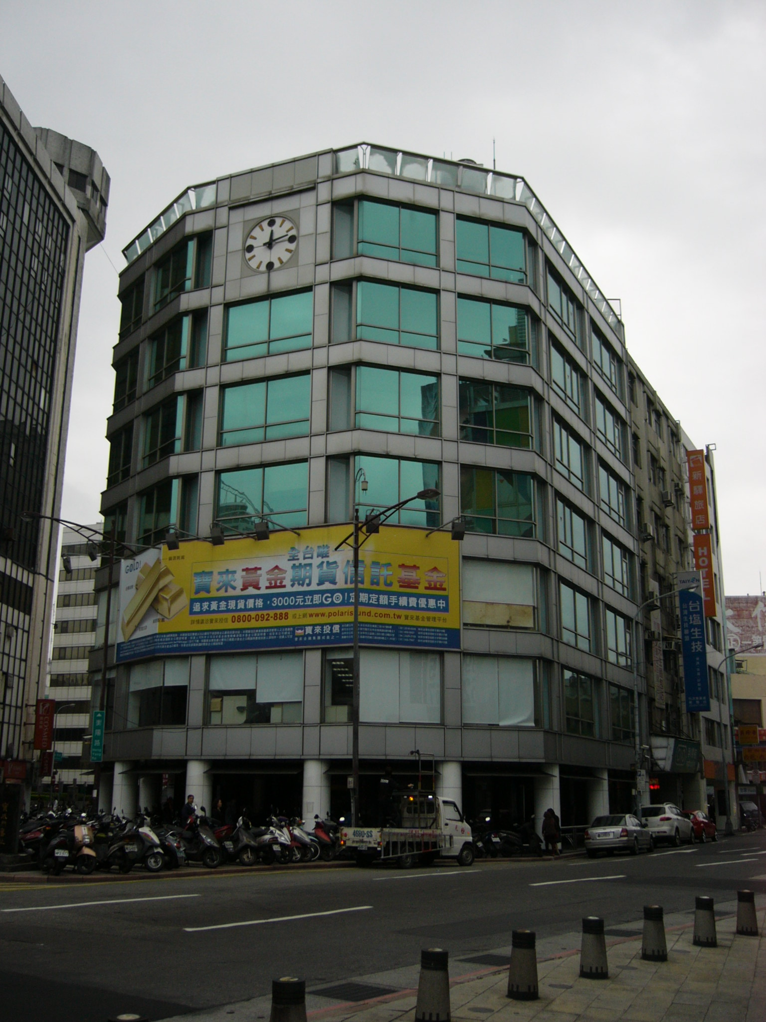 中文（台灣）: 寶來證券金融大樓，位於臺北市中正區寶慶路69號，2012年12月時已經改掛元大金控商標，現為元大商業銀行西門分行。